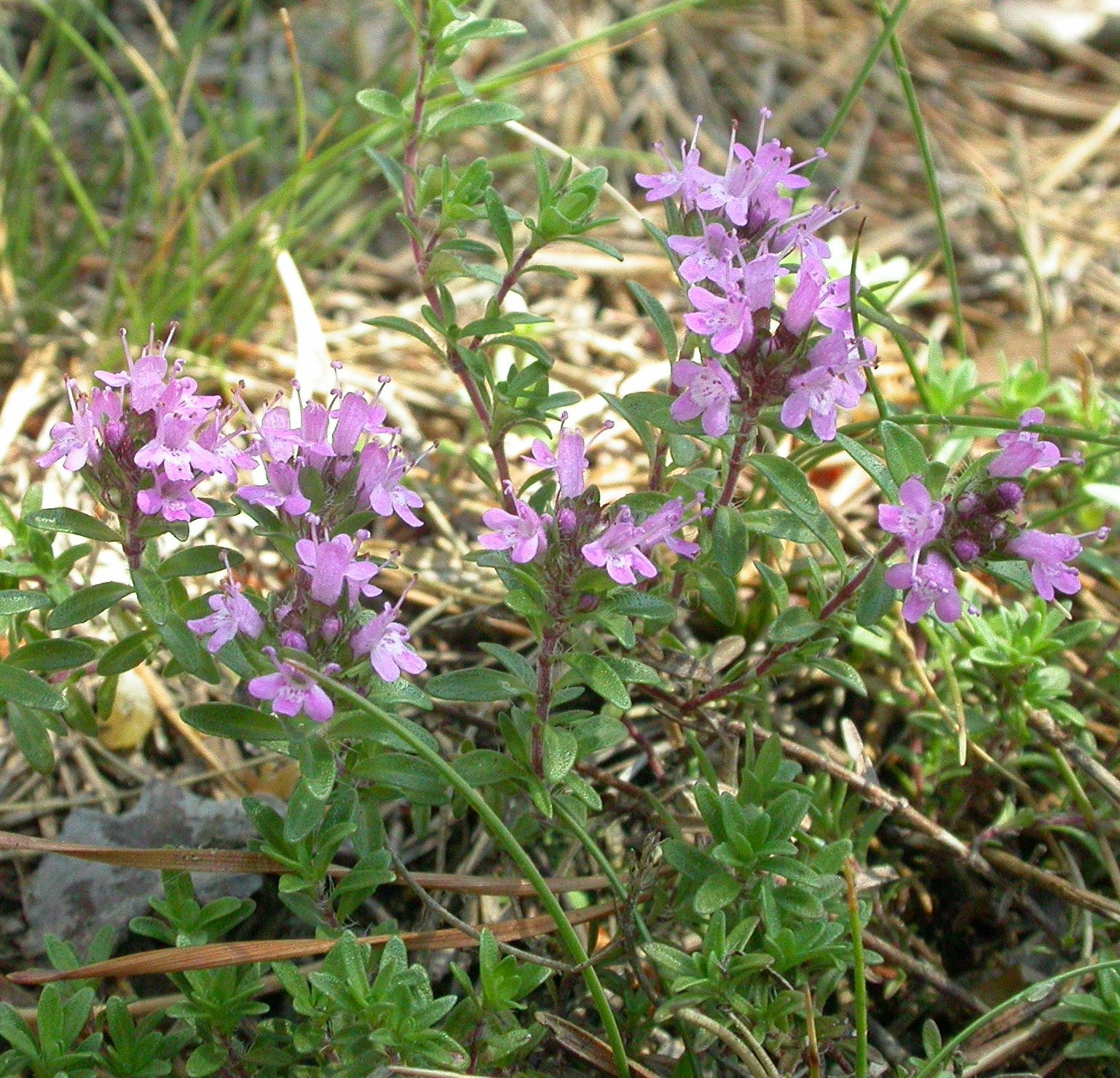 Thymus serpyllum,Hradčanské stěny, Czech Republic